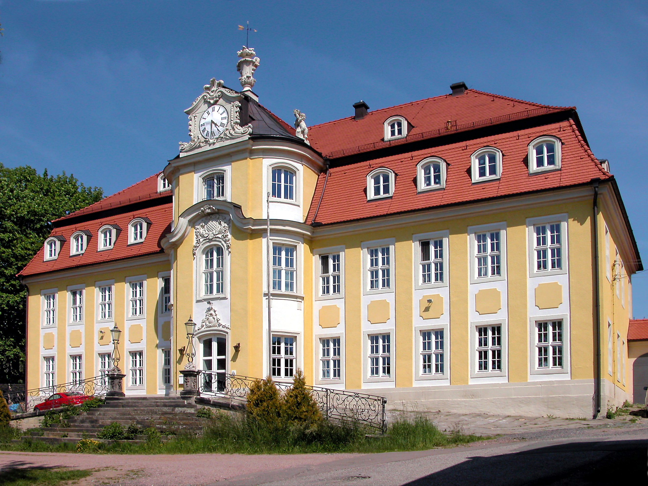 30.05.2004 04720 Choren (Mochau): Barockschloß, 1755 durch Samuel Locke für Carl Leonhardt von Bieberstein errichtet. [DSCN3561.TIF]20040530100DR.JPG(c)Blobelt